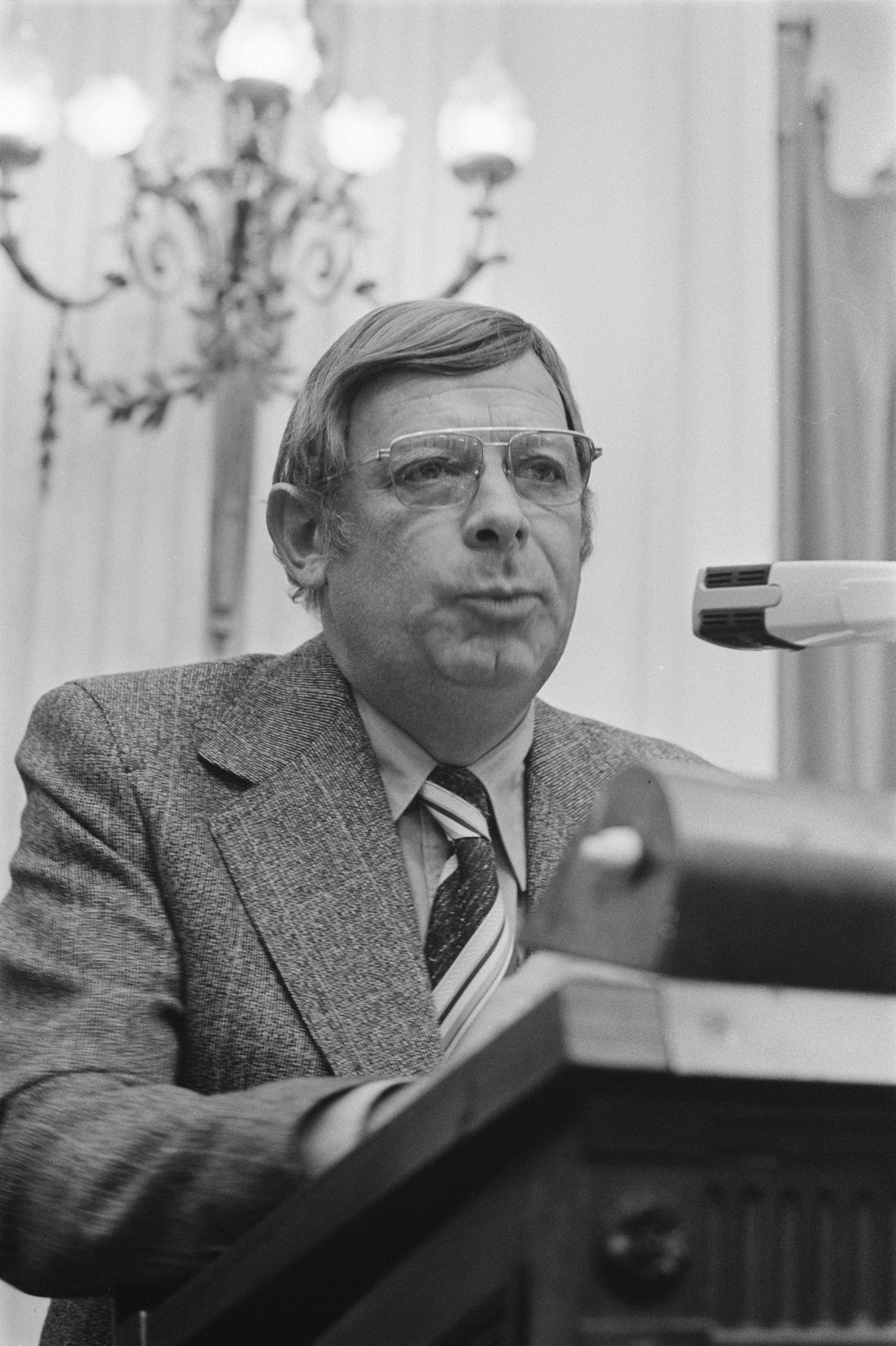 Collectie / Archief : Fotocollectie Anefo Reportage / Serie : Tweede kamer debatteert over de gevolgen van de olieboycot Beschrijving : Kamerlid Beuker (RKPN) aan het woord Datum : 31 oktober 1973 Locatie : Den Haag, Zuid-Holland Trefwoorden : kamerleden, olieboycot, oliecrisis, portretten Persoonsnaam : Beuker, Klaas Fotograaf : Bert Verhoeff / Anefo Auteursrechthebbende : Nationaal Archief Materiaalsoort : Negatief (zwart/wit) Nummer archiefinventaris : bekijk toegang 2.24.01.05 Bestanddeelnummer : 926-7945